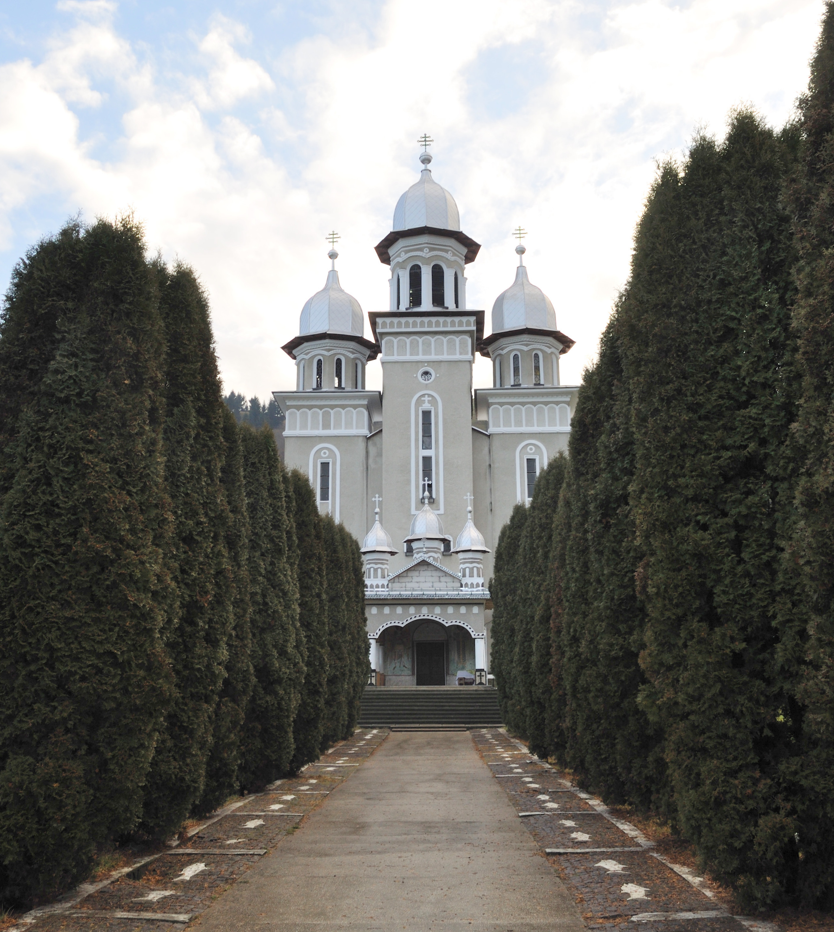 Biserica ucraineană „Pogorârea Duhului Sfânt” din Poienile de sub Munte, județul Maramureș